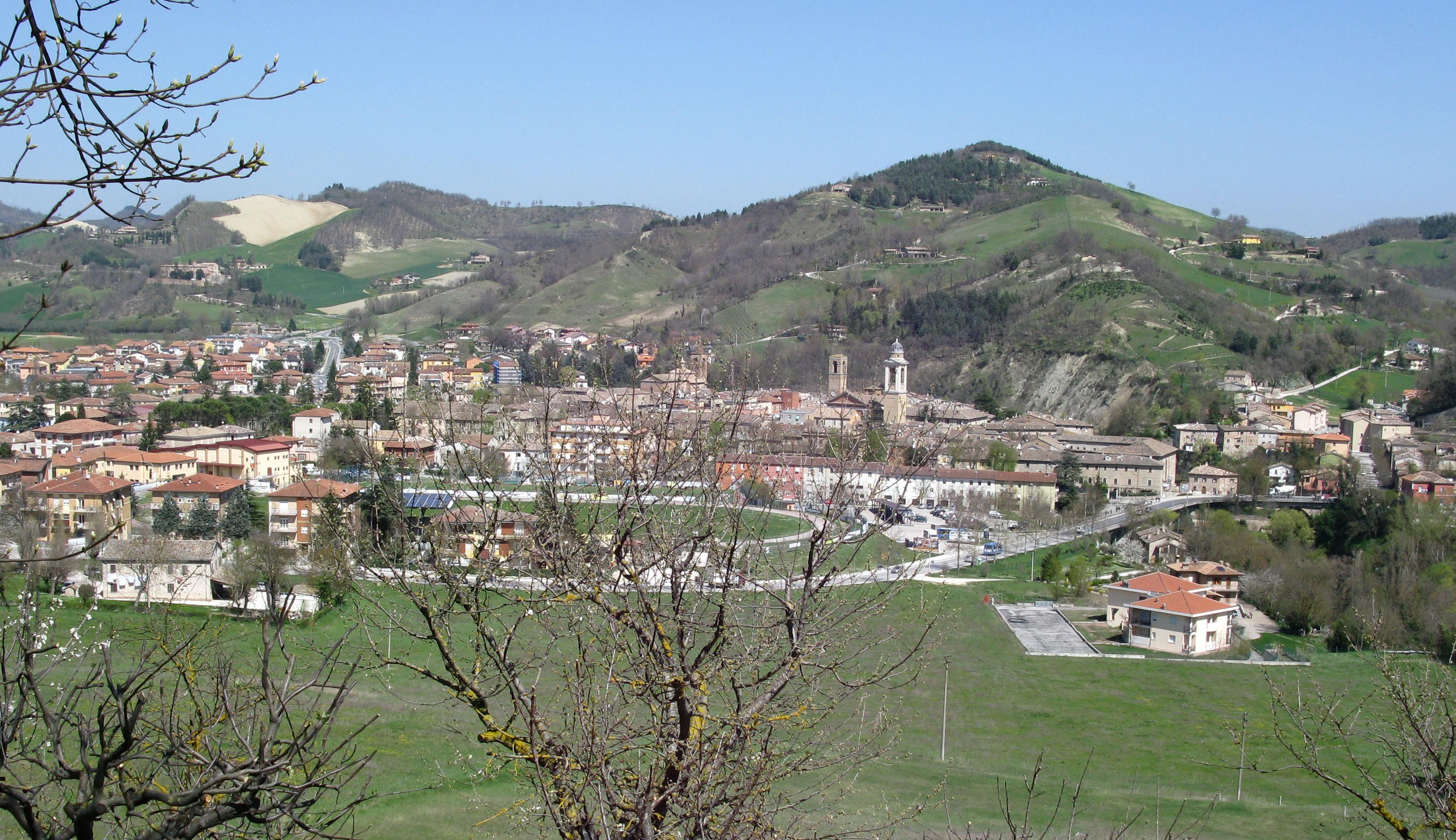 Panorama di Urbania.